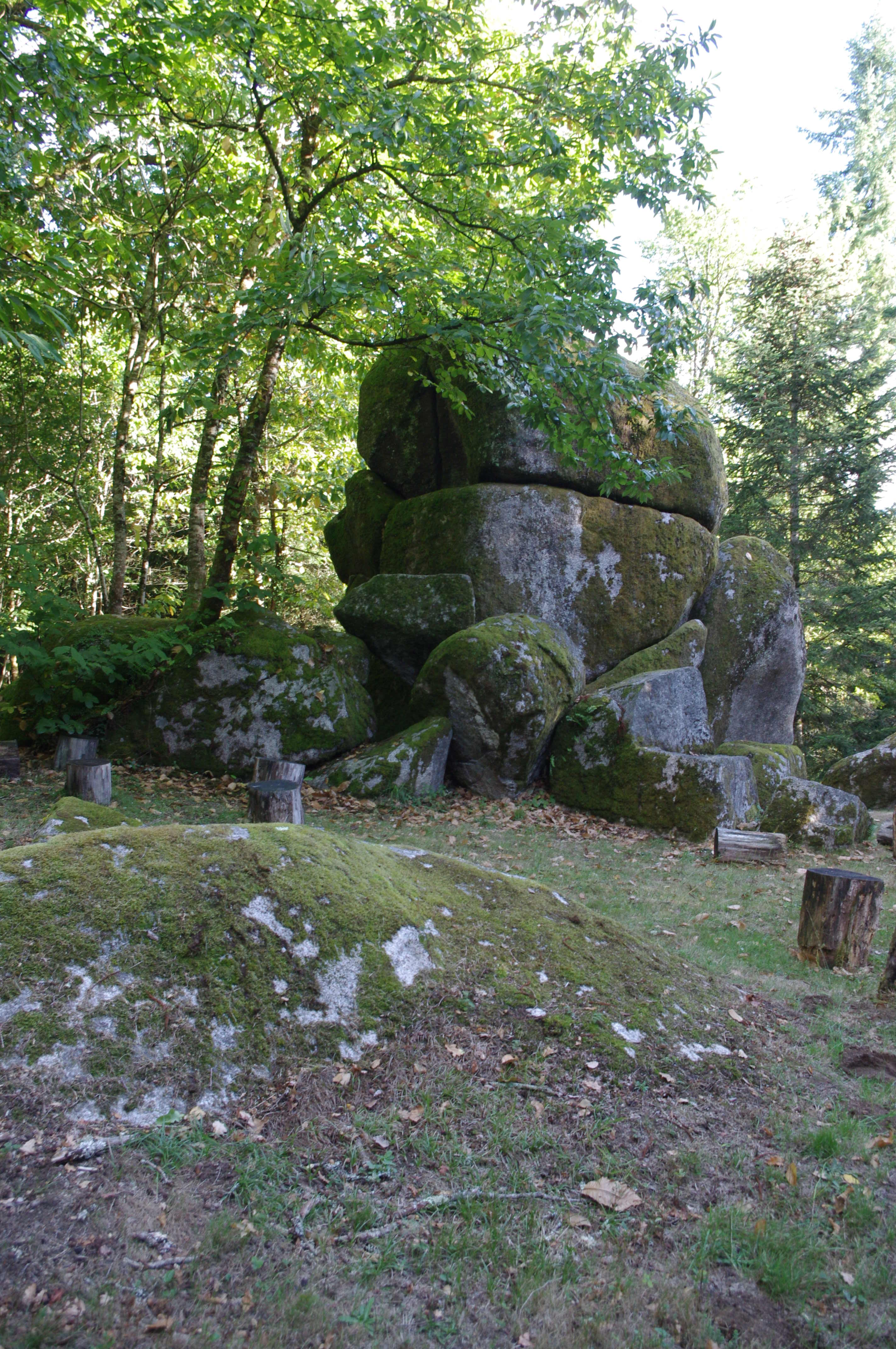 Rochezide (aussi roche Ezide, roche Ezyde, rocher de la bergère) à Augignac, Dordogne, Frankreich